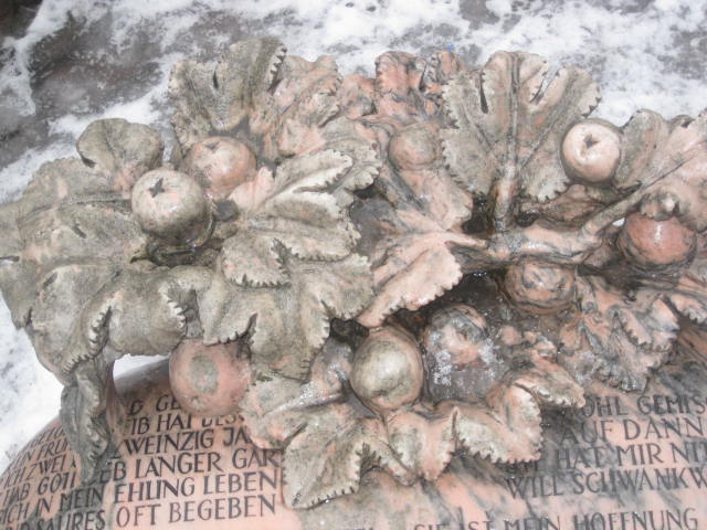 Herz mit Rosenstock, Detail am Hans-Sachs-Brunnen (Ehekarussell) in Nürnberg